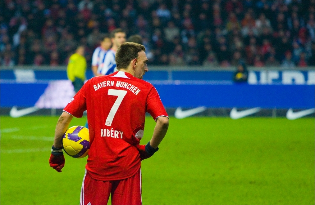 Franck Ribery -ein wenig ratlos